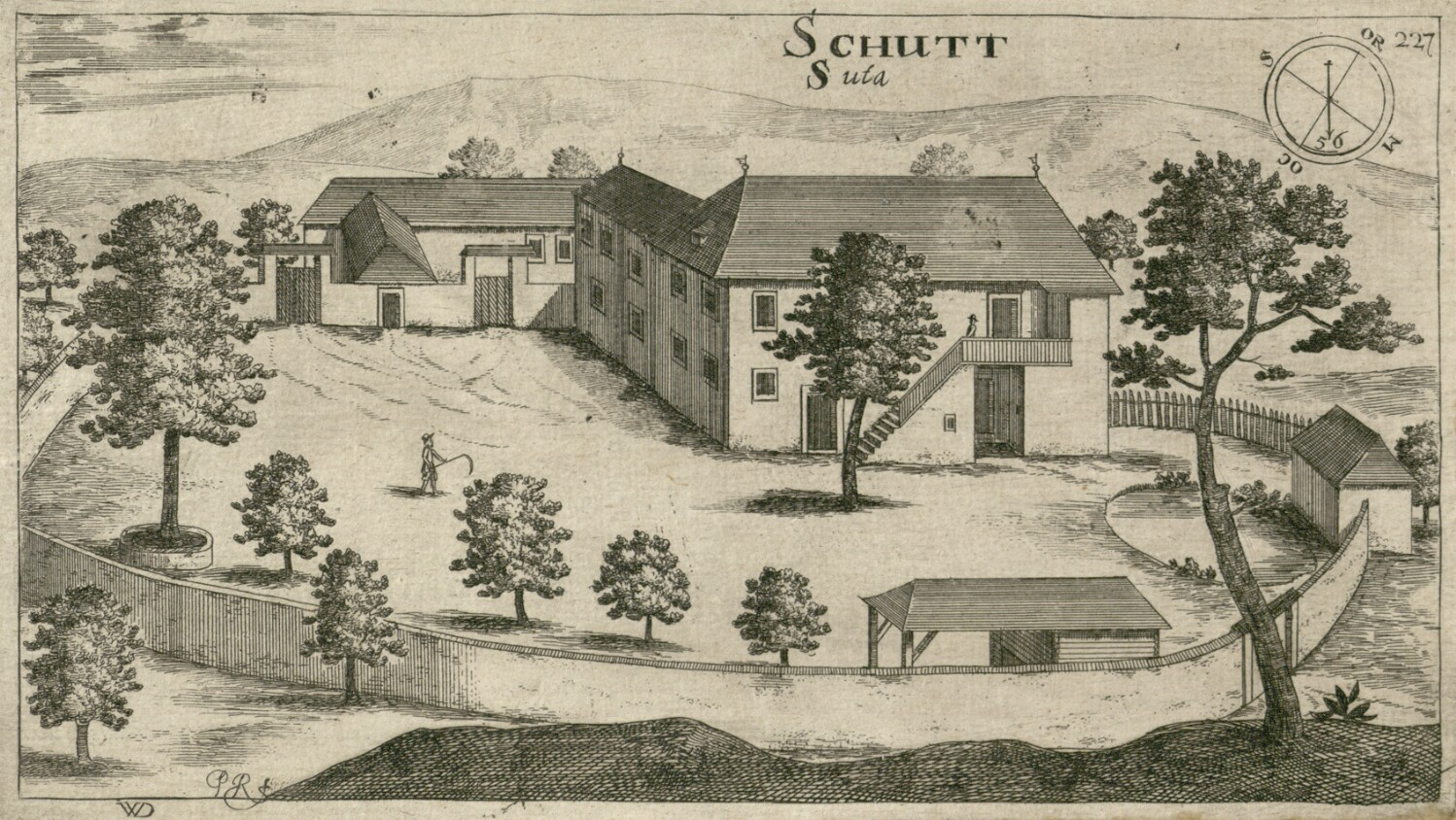 Dvorec Šuta